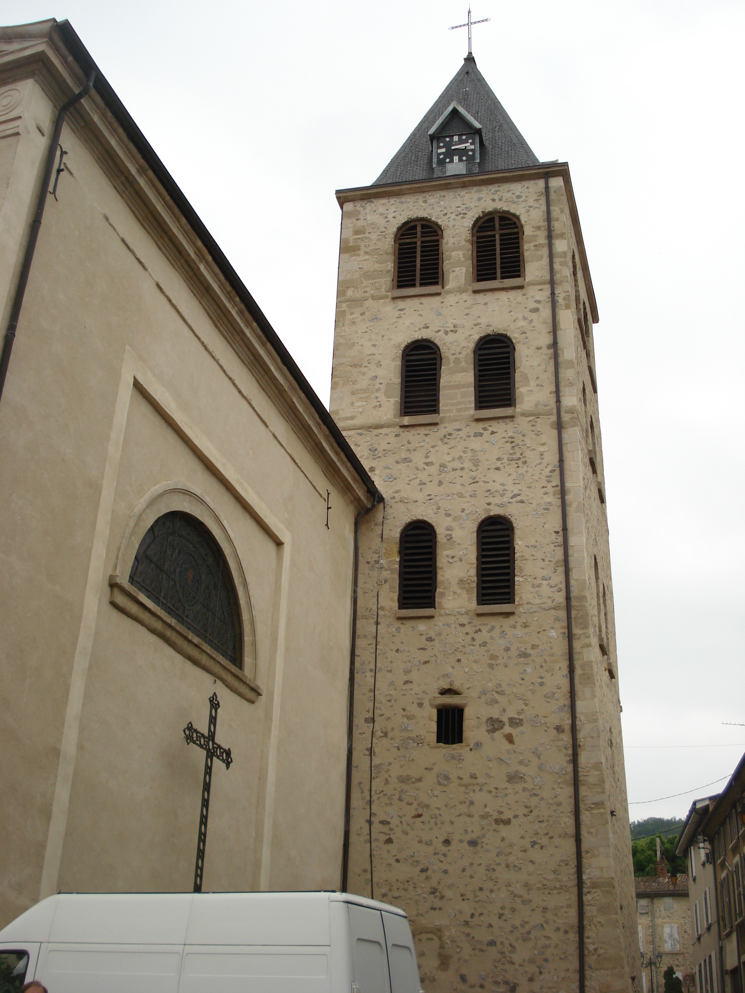 église Saint Valéry de Saint-Vallier dans la Drôme